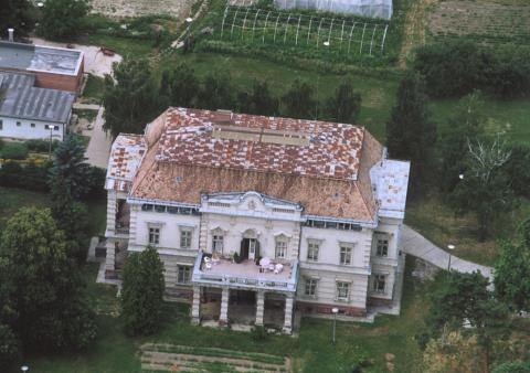 Ötvöskónyi, Czindery-kastély